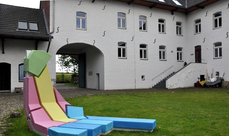 Haupthaus Gut Rosenberg in Horbach, Aachen, historischer Vierseithof